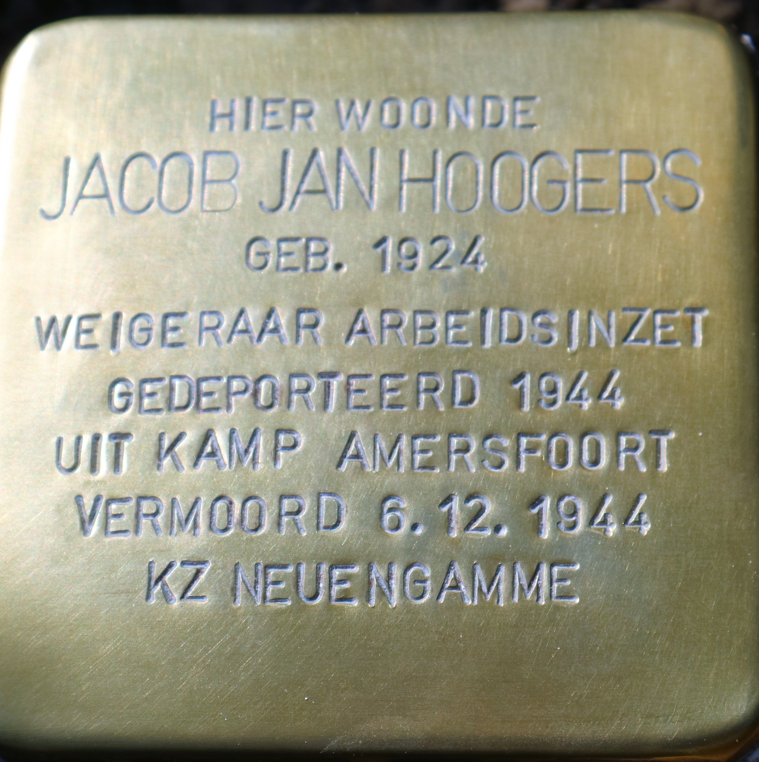 Stolperstein voor J.J. Hoogers, 18 april 2018